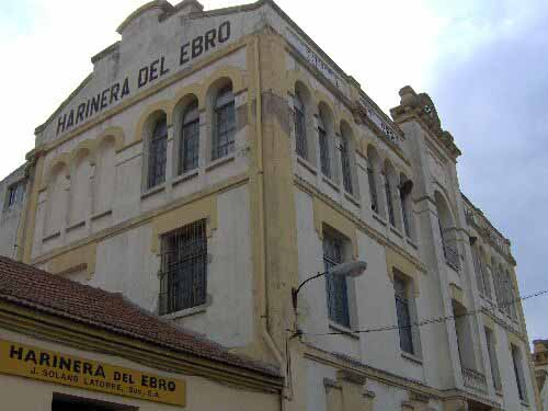 Harinera del barrio de Casetas (Zaragoza)